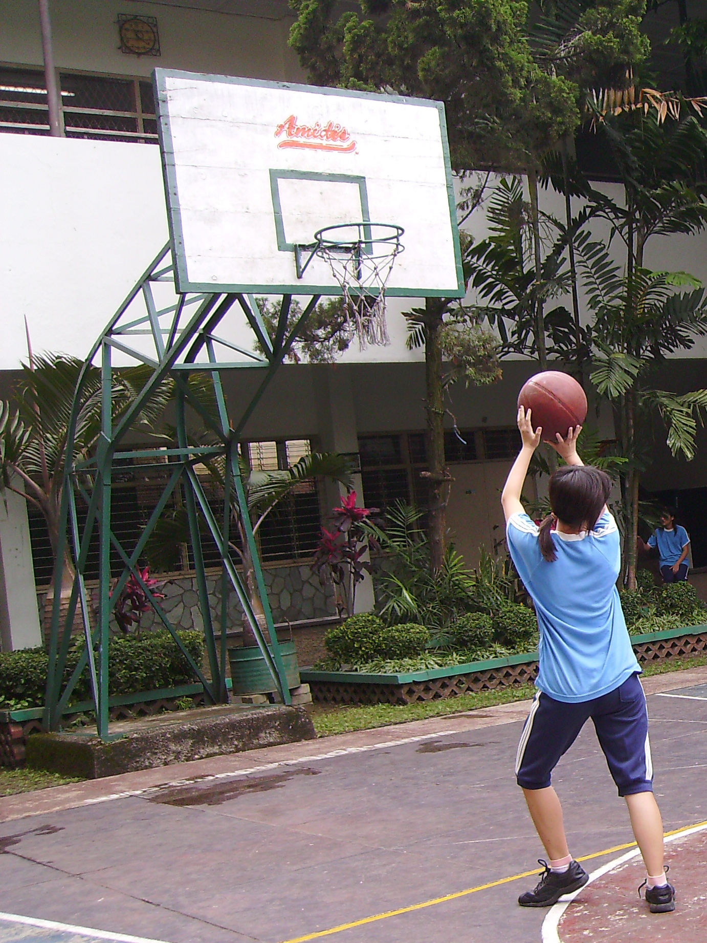 Seorang Siswi SMA Trinitas sedang melakukan "shoot"